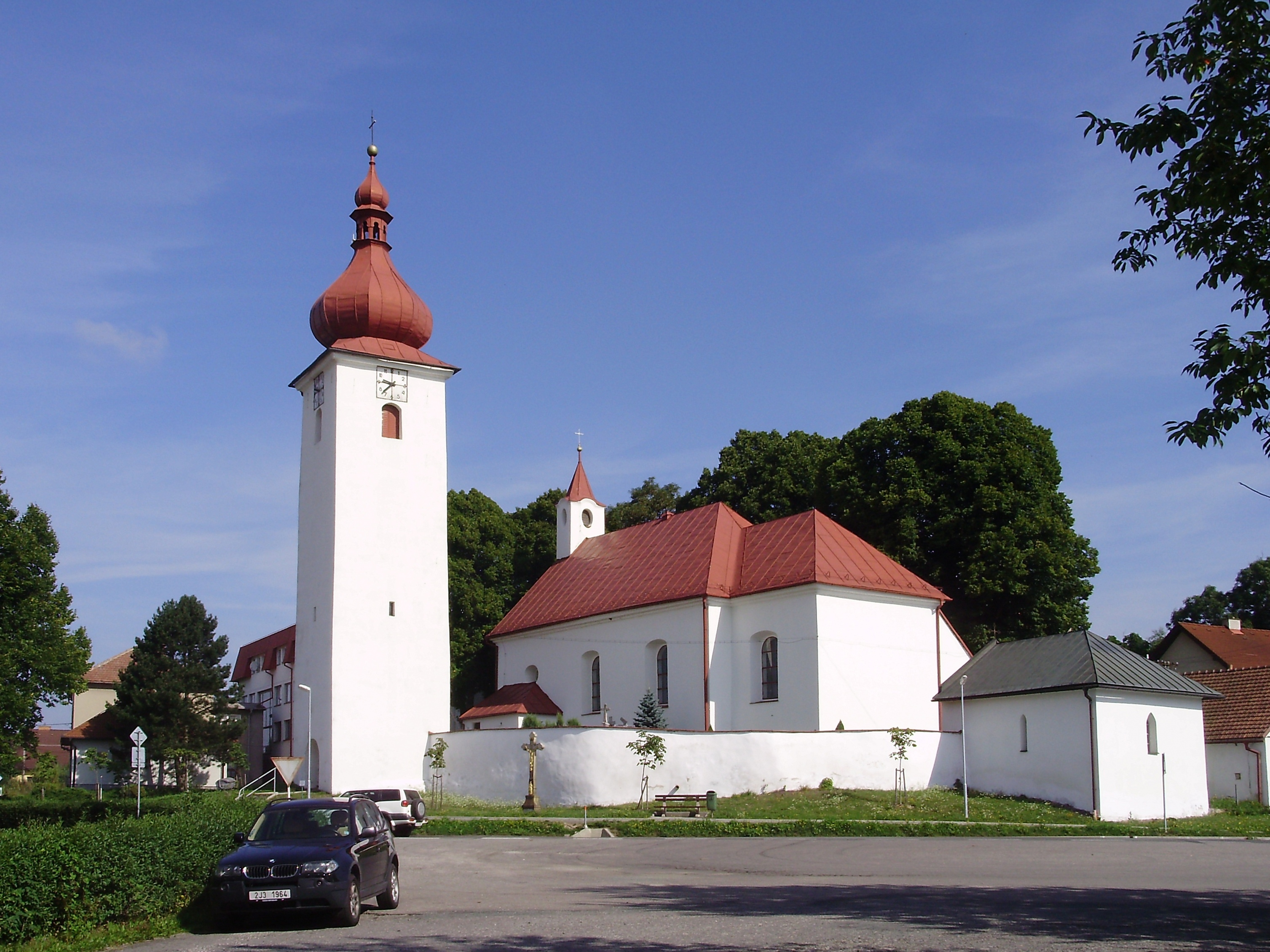 Farní kostel sv. Bartoloměje v Radostíně nad Oslavou